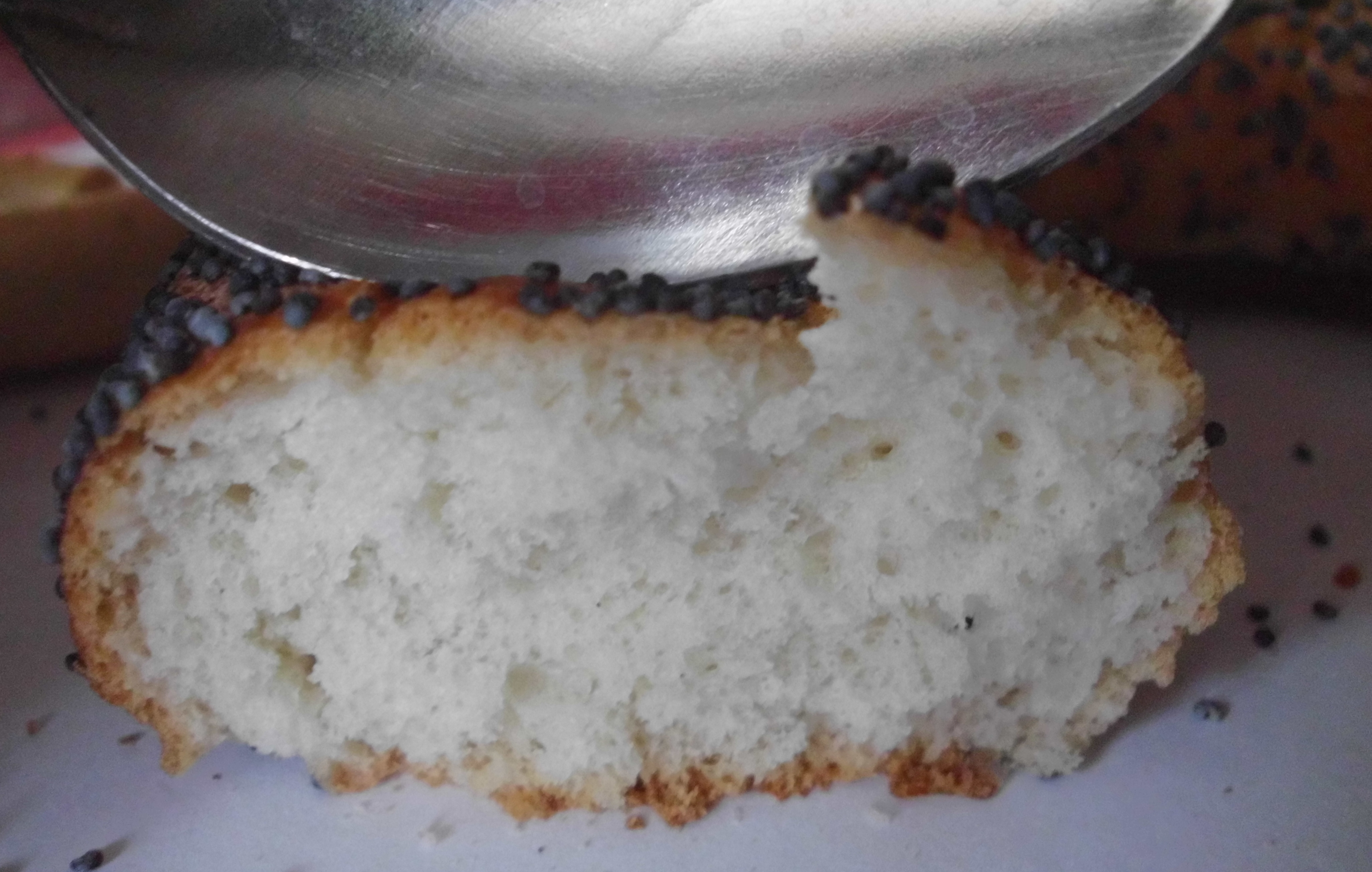 Бараночные изделия на изломе: бублик. Сминание при надавливании твёрдым предметом.